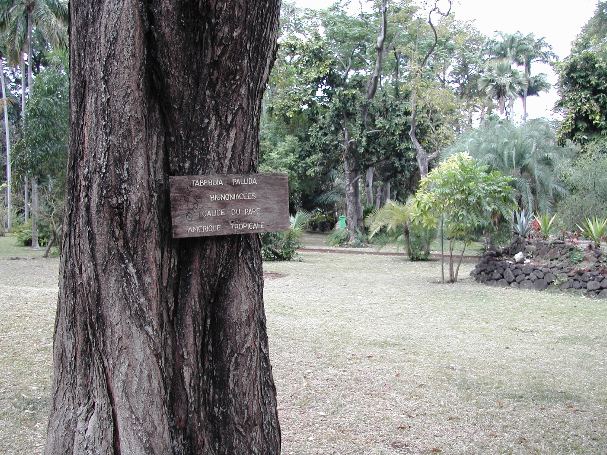 Tabebuia pallida dans le Jardin de l'État de Saint-Denis.